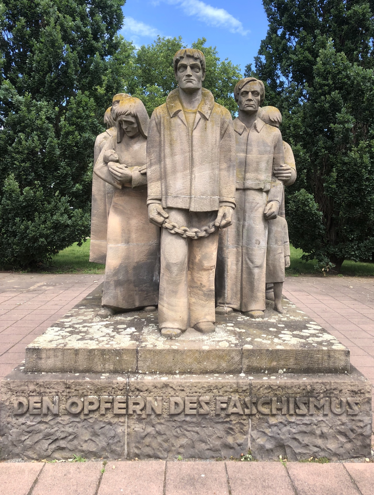 Mahnmal Weg in den Tod Schönebeck